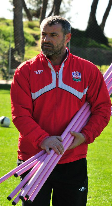 Леонид Кудаев